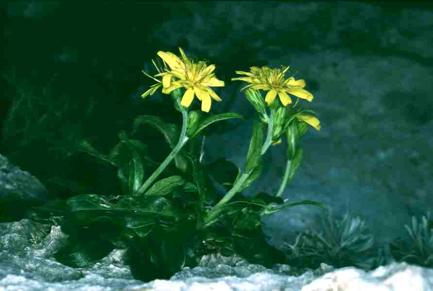 Sicilian botanical endemisms Hieracium lucidum